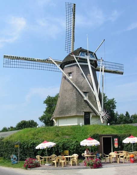 Beltmolen De Duif te Nunspeet (Foto: Hans de Kroon)